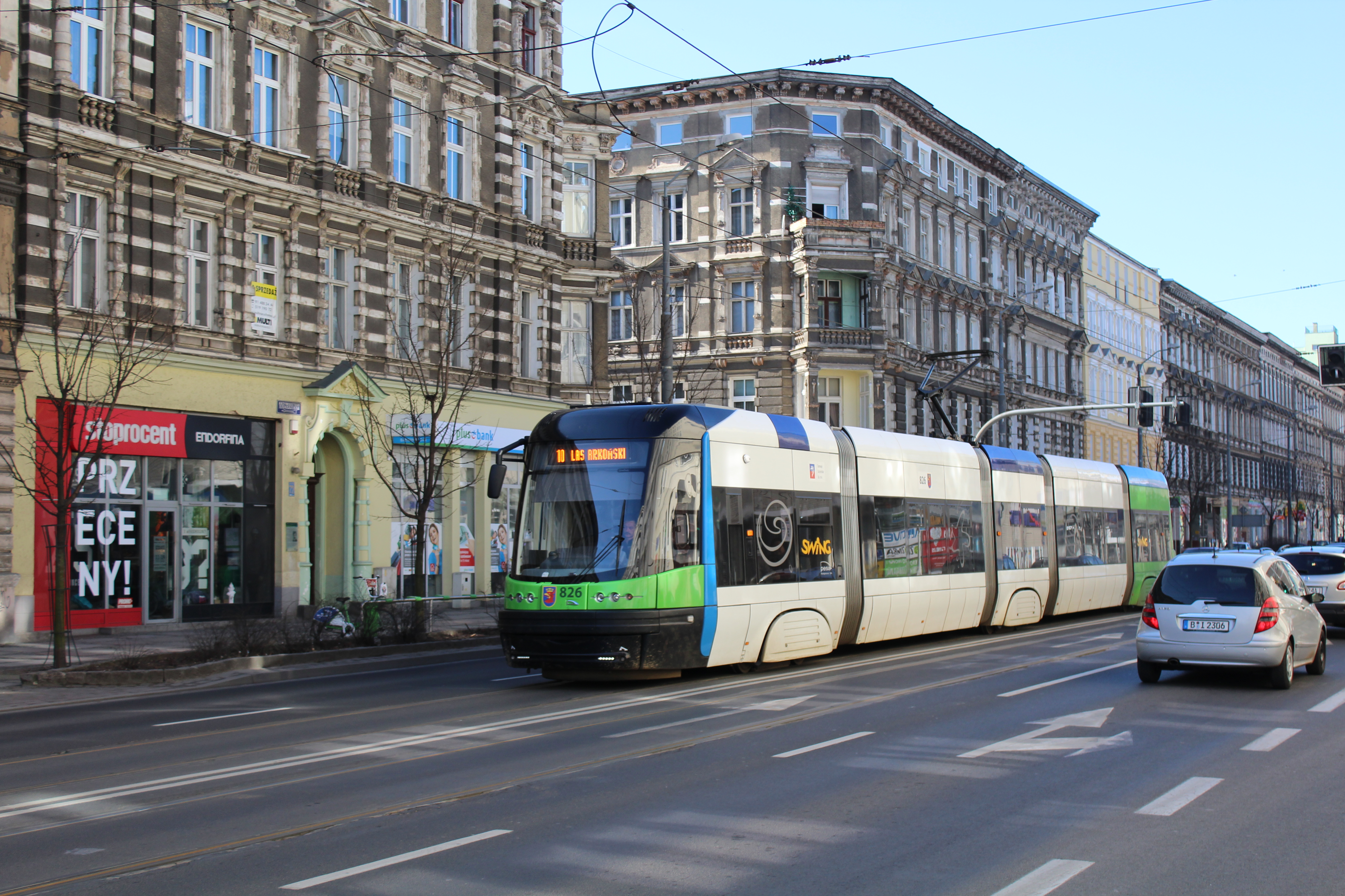 PESA 120Na na ul. Krzywoustego w Szczecinie